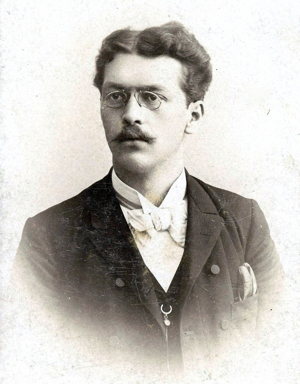 Нижанківський Остап Йосипович: Нижанківський Остап Йосипович